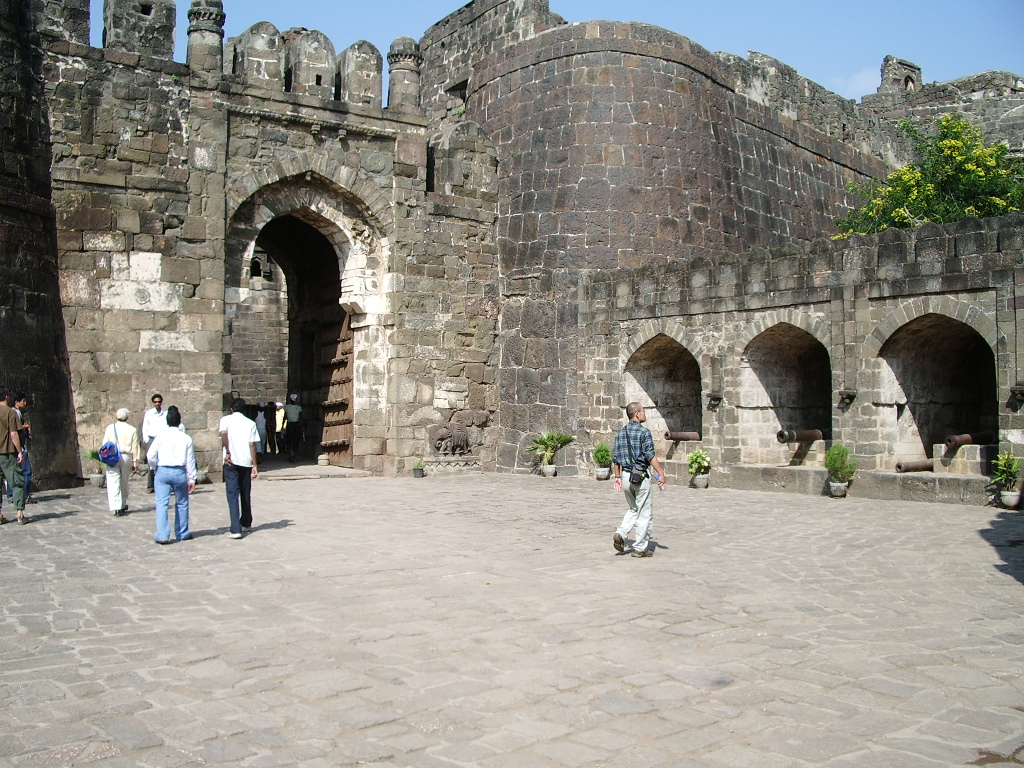 ダウラタバード要塞の門